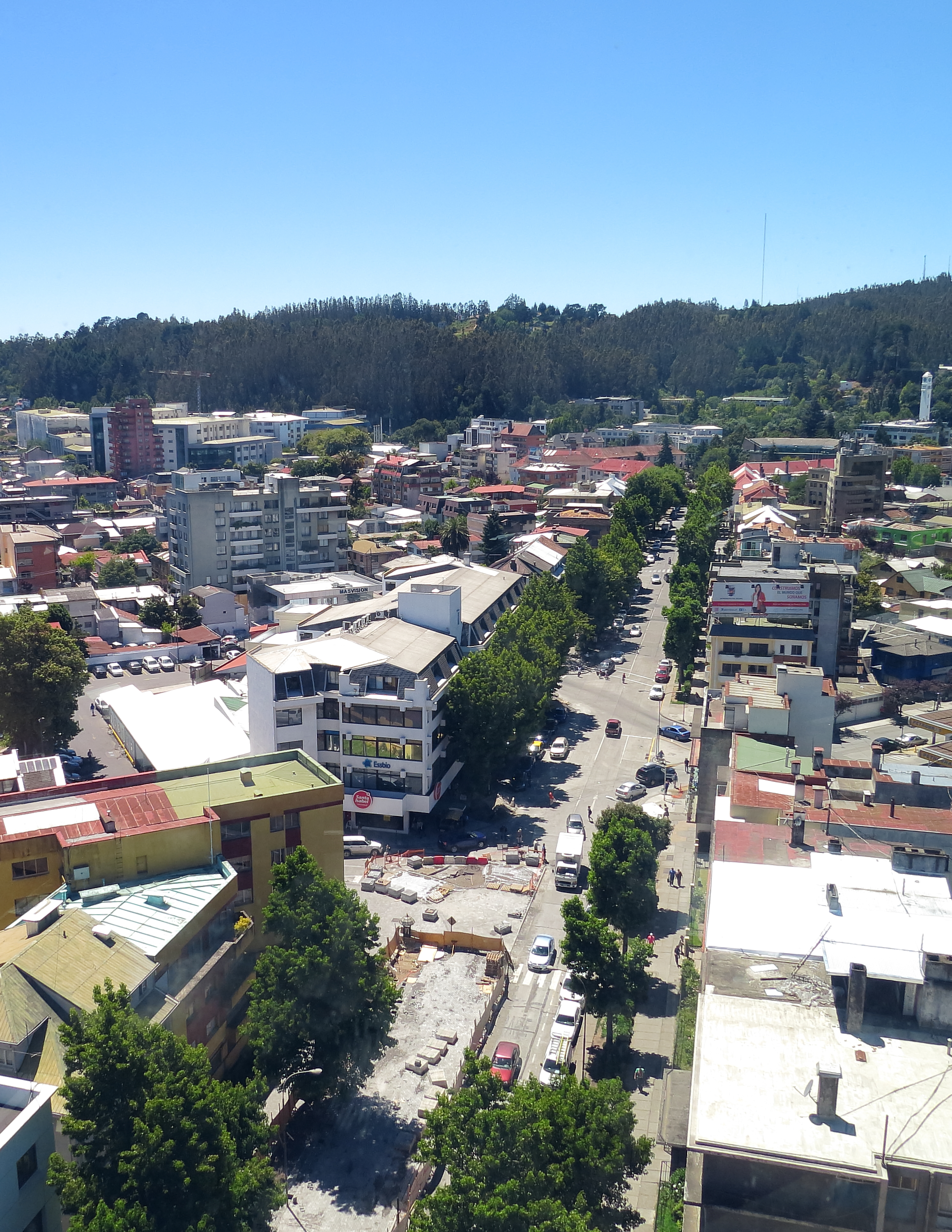 Remodelación de la Diagonal Pedro Aguirre Cerda de Concepción. Trabajos efecutados en Diciembre de 2012